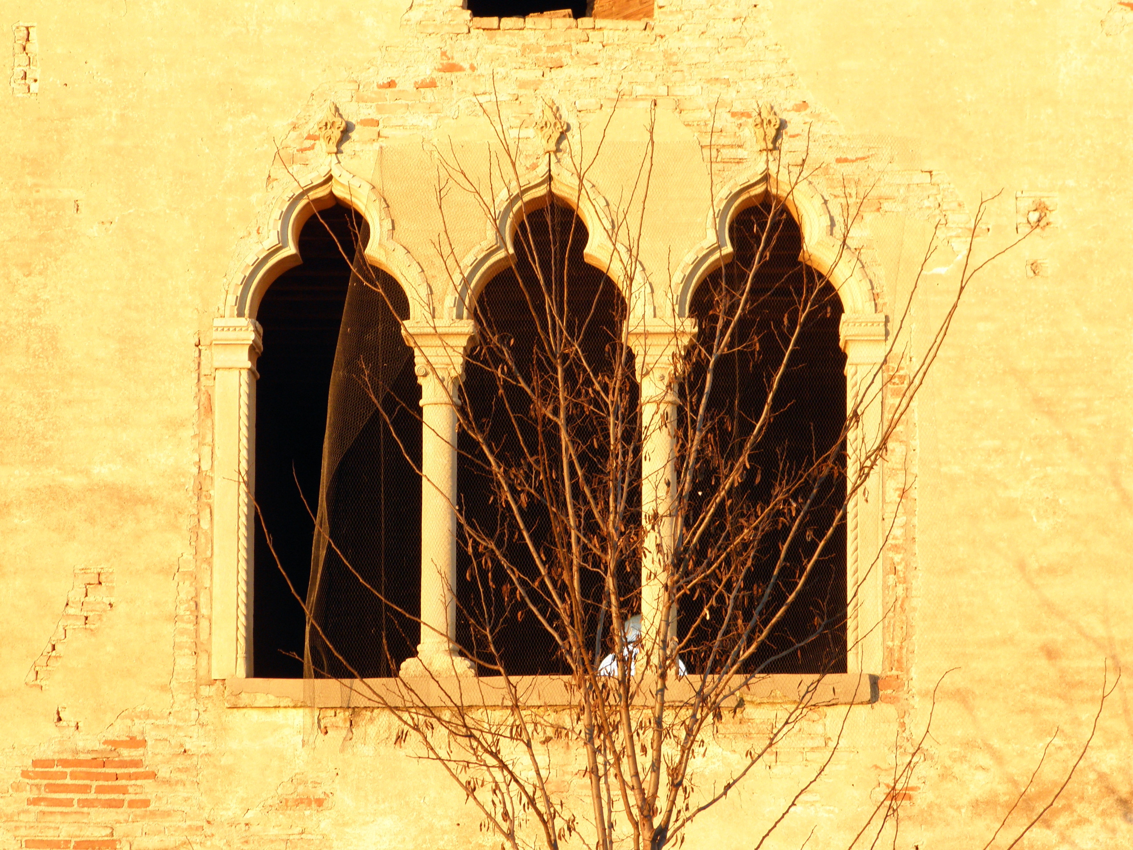 Agugliaro, la quattrocentesca Villa Dal Verme.